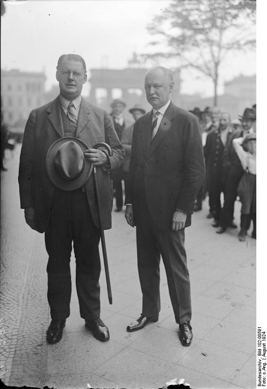 Der Vizebürgermeister von New York in Berlin ! Holbert, (rechts) weilt Augenblicklich zu Studienzwecken in Berlin. Unser Bild zeigt ihn mit dem Besitzer des großen Berliner Luxushotels Louis Adlon.